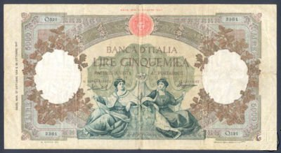 Banconota da 5000 lire italiana serie Repubbliche Marinare (fronte)